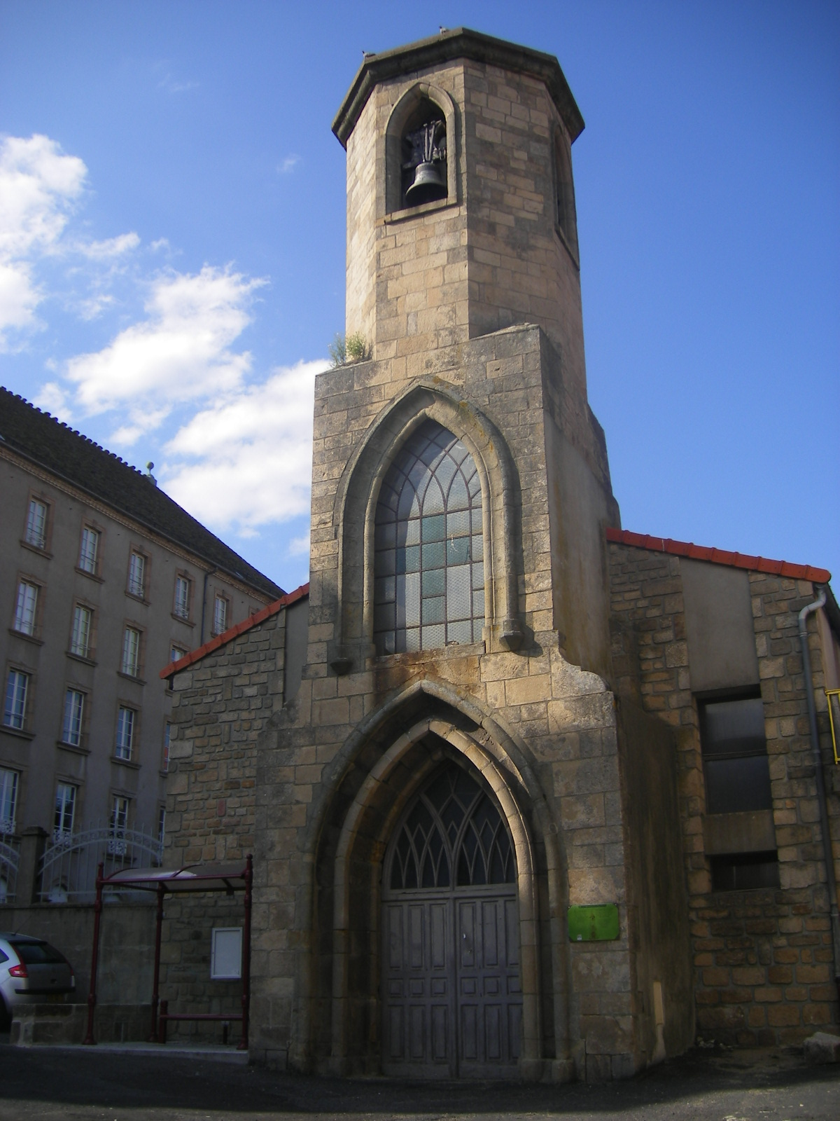 Langogne - Couvent des Jacobins